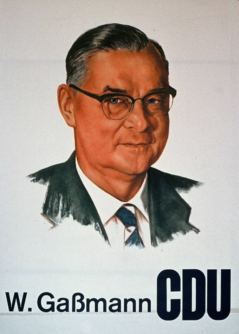 Abbildung: Porträtzeichnung Plakatart: Kandidaten-/Personenplakat mit Porträt Auftraggeber: Verantw.: W. Gaßmann CDU Drucker_Druckart_Druckort: Repro-Druck, Schmiden bei Stuttgart Objekt-Signatur: 10-001: 972 Bestand: Plakate zu Bundestagswahlen (10-001) GliederungBestand10-18: Plakate zu Bundestagswahlen (10-001) » Die 4. Bundestagswahl am 17. September 1961 » CDU » Mit Porträtfoto Lizenz: KAS/ACDP 10-001: 972 CC-BY-SA 3.0 DE